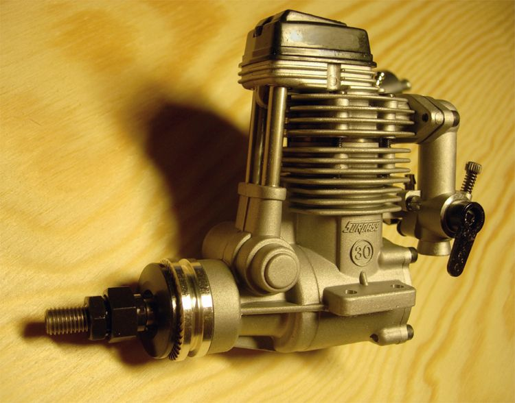 Hehkutulppamoottori: O.S. FS-30